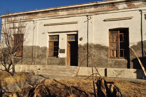 Castellano